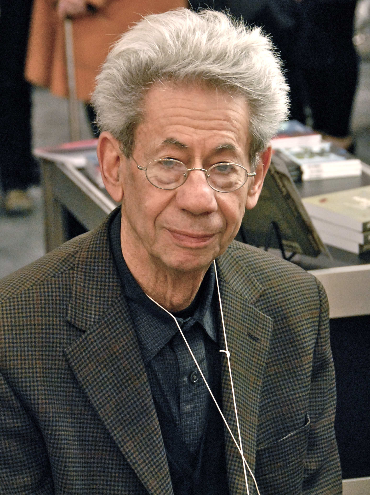 Gabor Szilasi, lors du Salon international du livre de Québec 2012